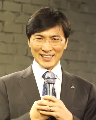 [벙커1특강] 안희정 - 산다는 것은 끊임없는 시작입니다